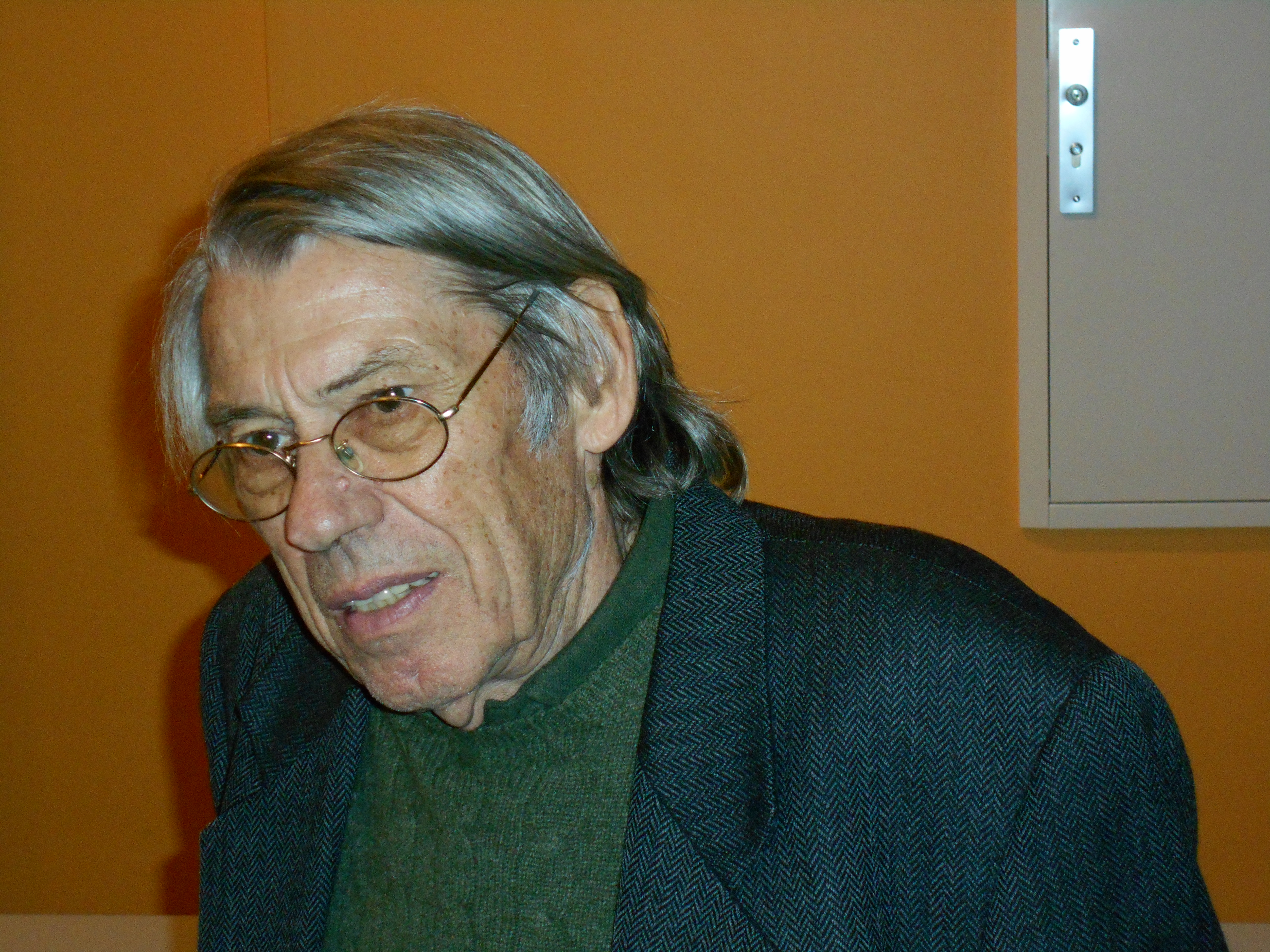 Der deutsche Historiker Hannes Heer